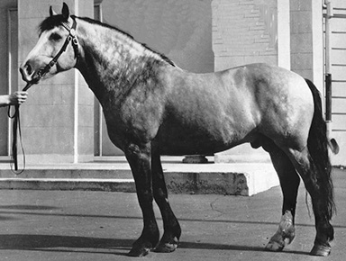 Белорусская упряжная лошадь Орлик I. Буланой масти жеребец, родился 10 апреля 1950 года в колхозе «Восток» (деревня Солы Сморгонского района Гродненской области) от белорусско-гунбрансдальского жеребца Абрина и крупной аборигенной кобылы Гуты.